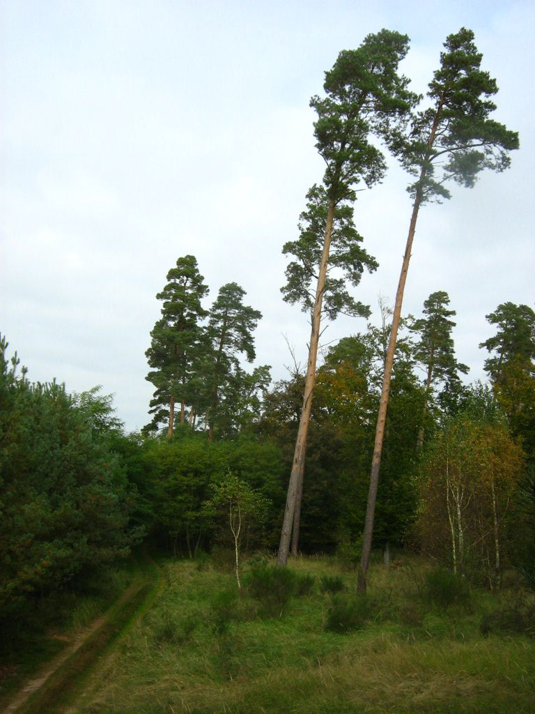 Alte Kiefern in der Baumgartner Heide (Stadt Gransee, Brandenburg).